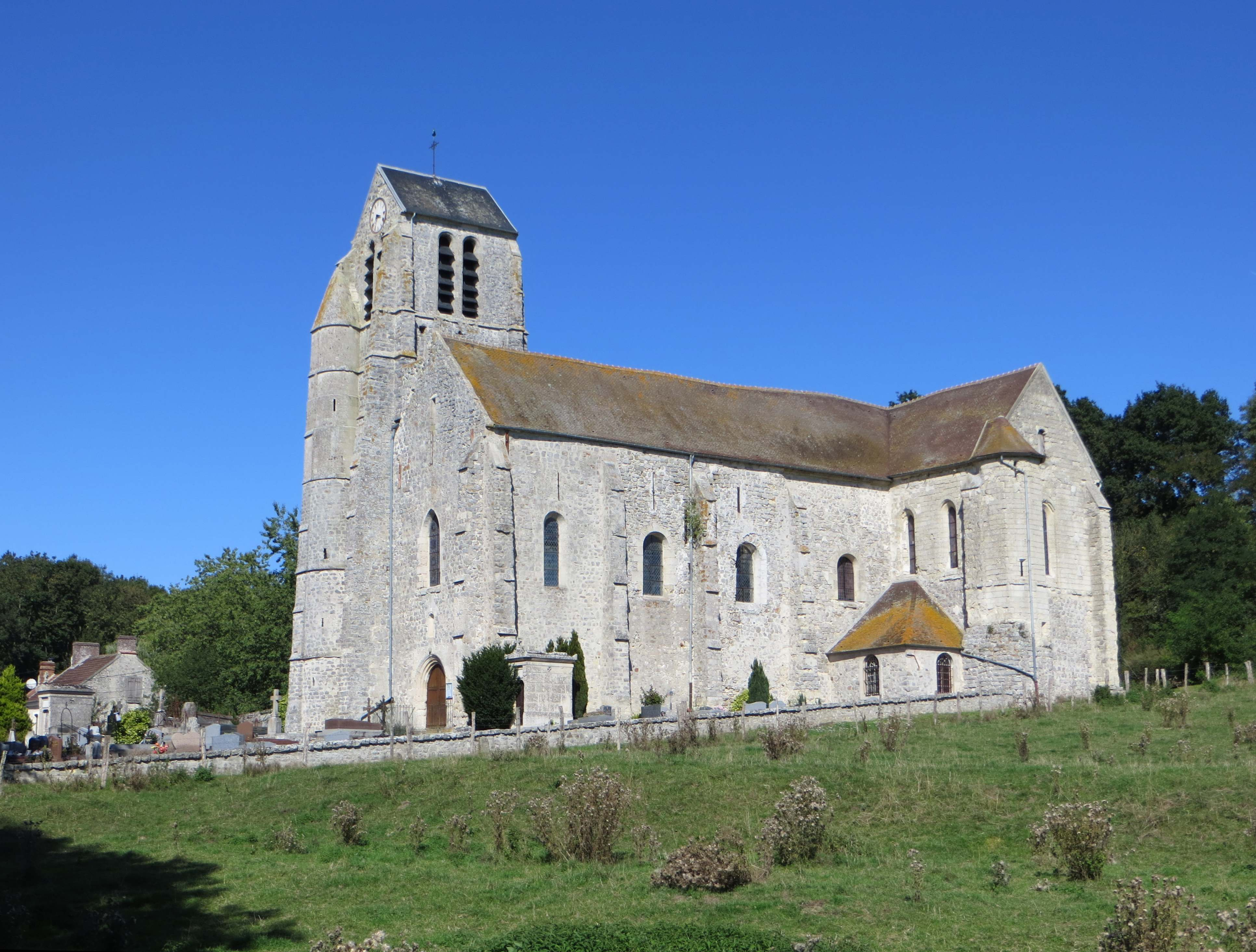 Vue de l'église